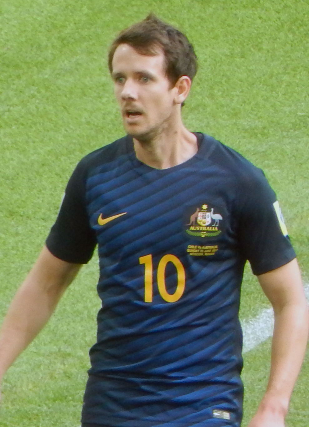 Матч Чили – Австралия